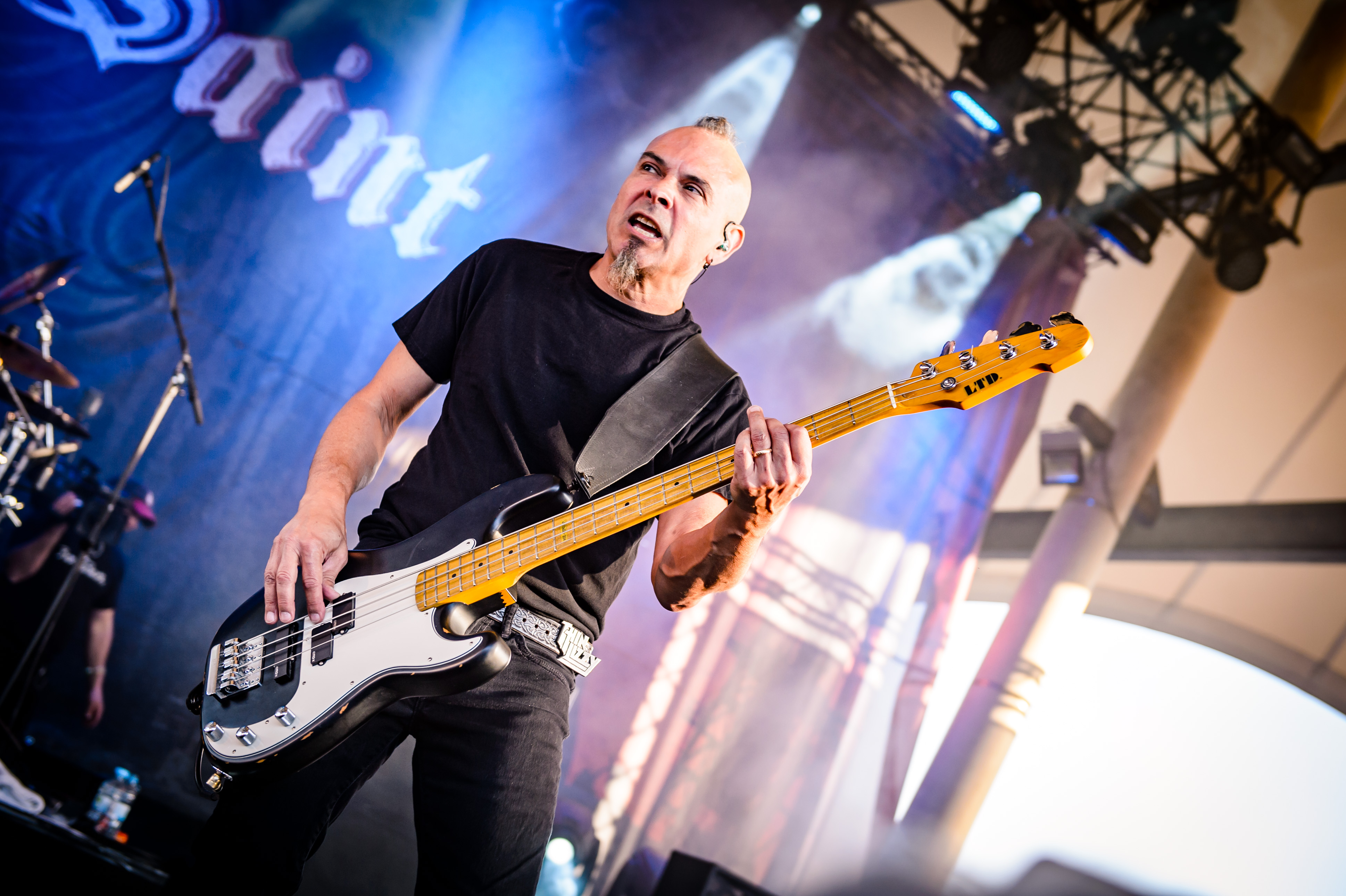 'Rock Hard Festival 2018; Amphitheater Gelsenkirchen': 'Armored Saint'